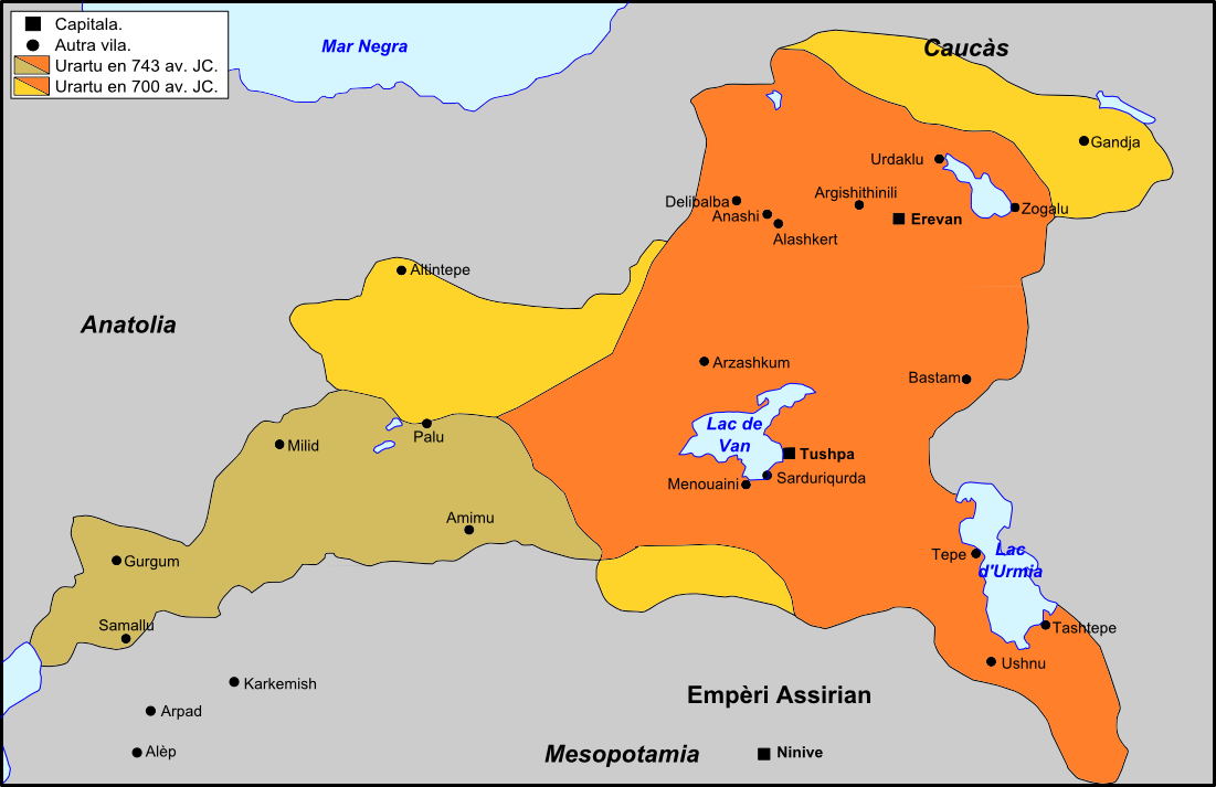 Evolucion territòri d'Urartu entre 743 e 700 av. JC.